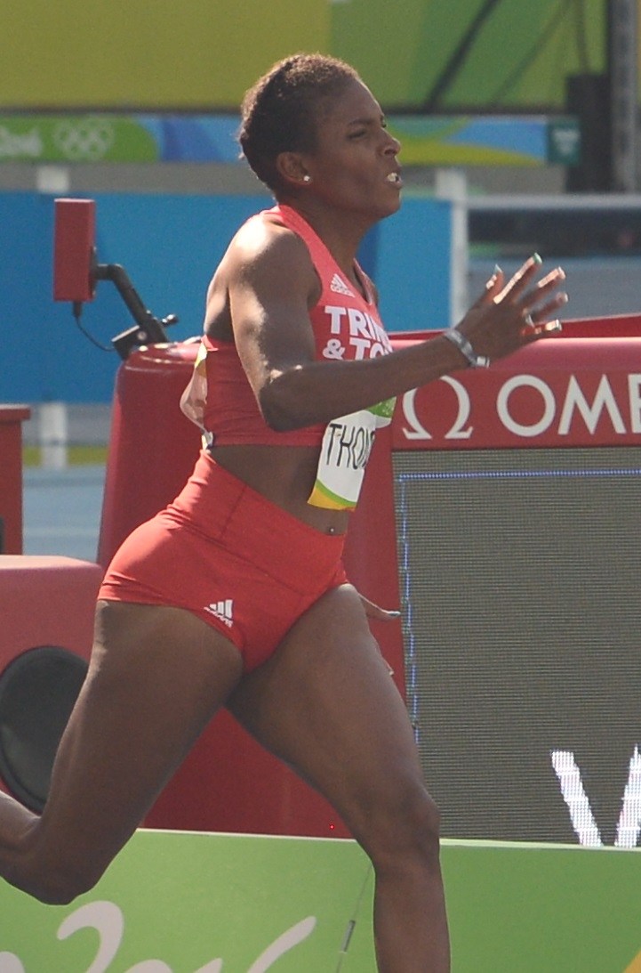 ReyareThomas dans la 1er série du 200m aux JO de Rio 2016